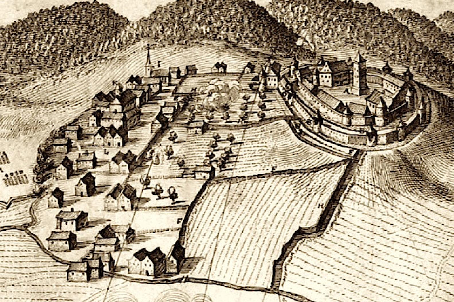 Château de Wasselonne 1674 détail de la carte de Mérian.